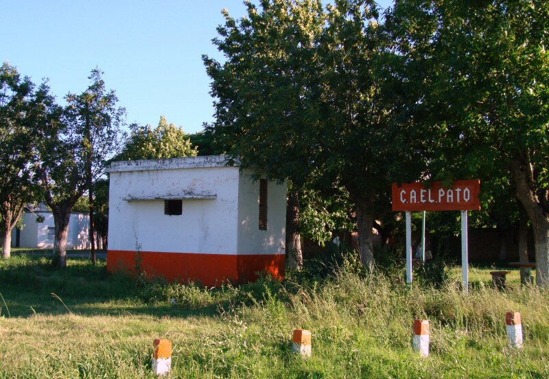 Parada Centro Agrícola El Pato del ex FCPBA